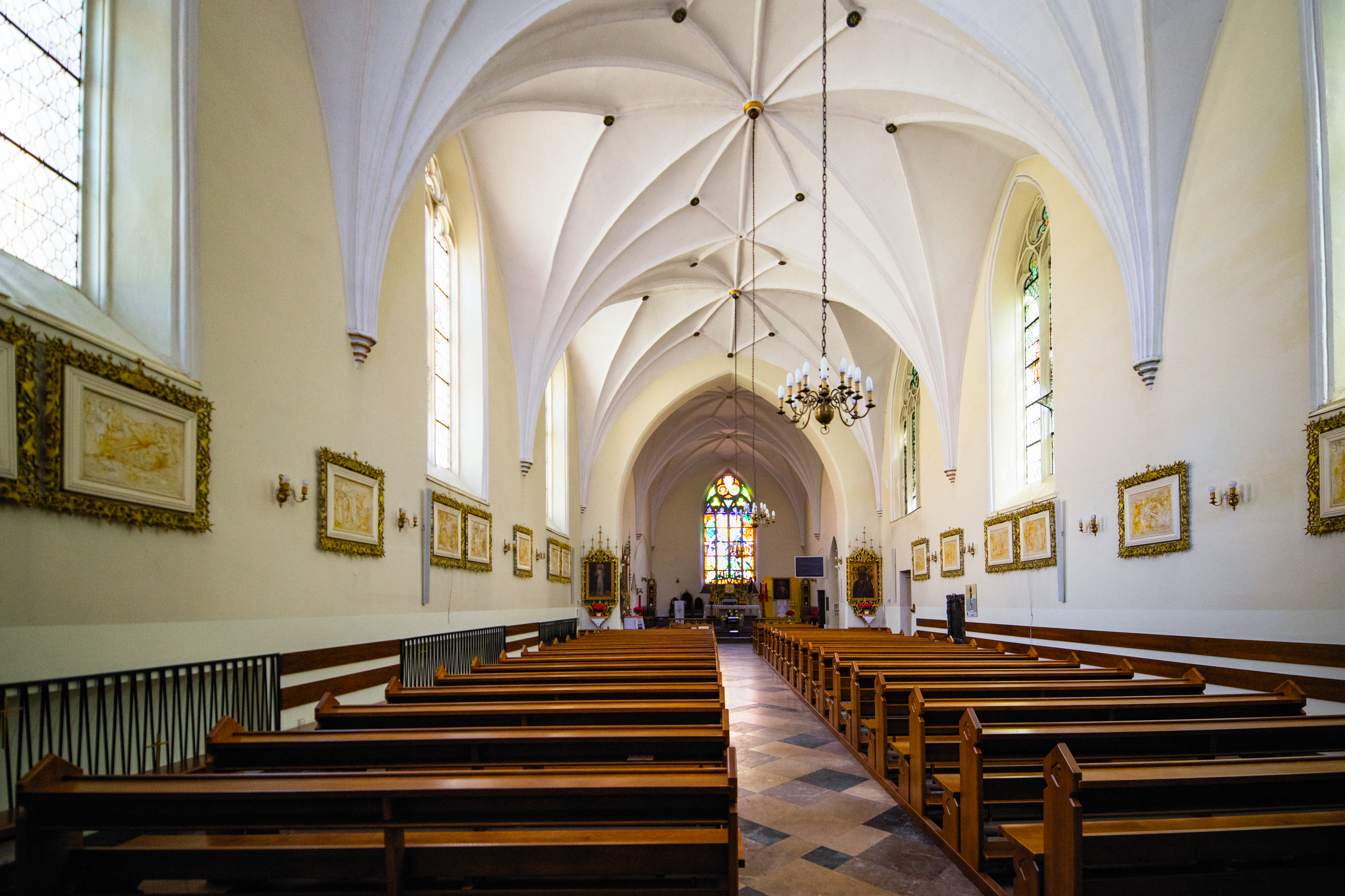 Gdańsk, Kościół św. Józefa w Gdańsku